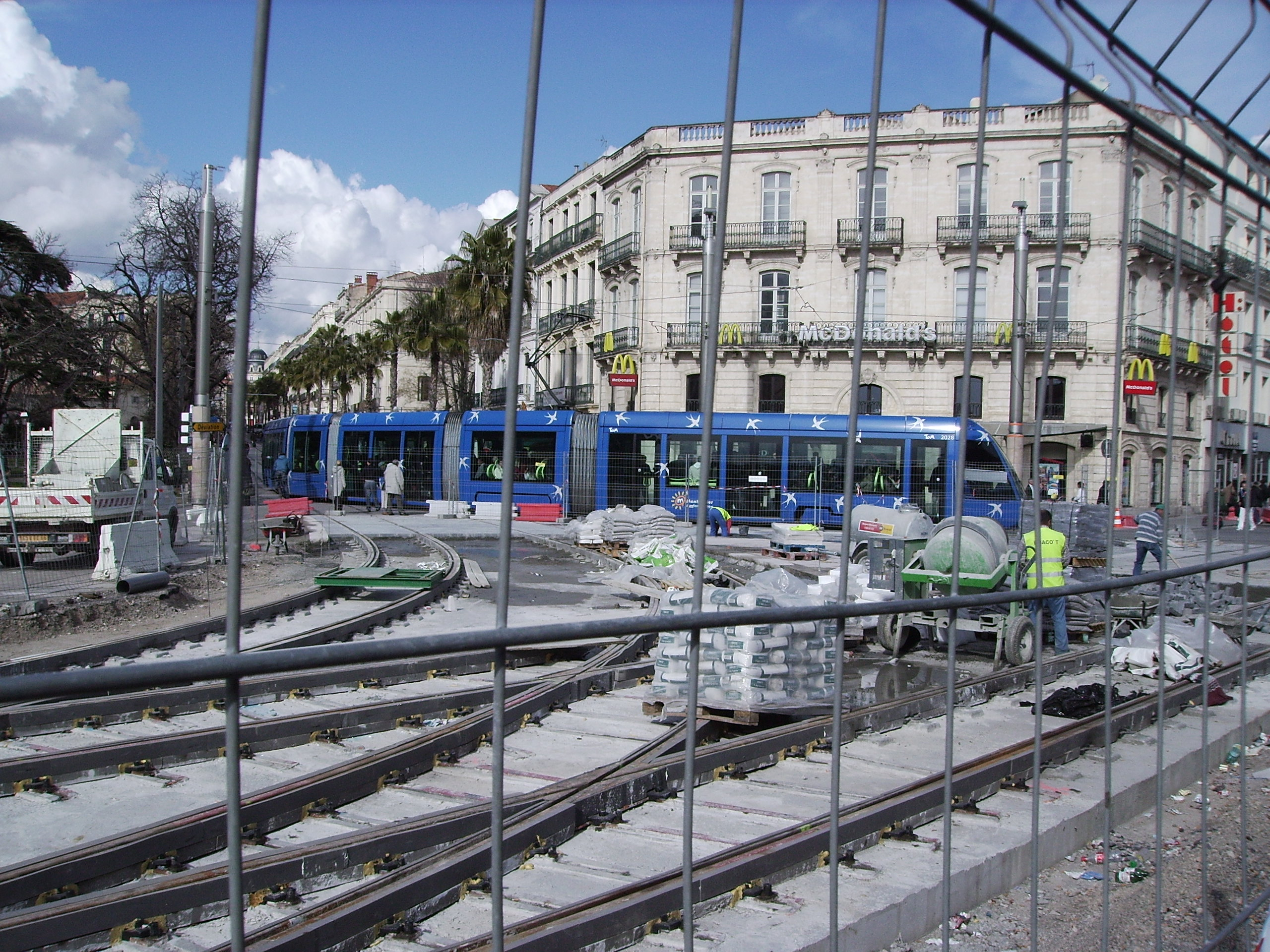 La ligne 2 du tramway de Montpellier en construction devant la gare Saint-Roch. Plutard aussi la ligne 4.